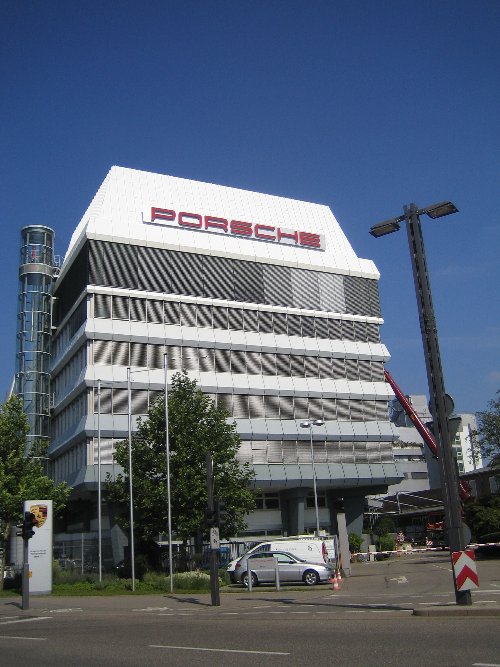 Porsche headquarter Stuttgart-Zuffenhausen Werk II